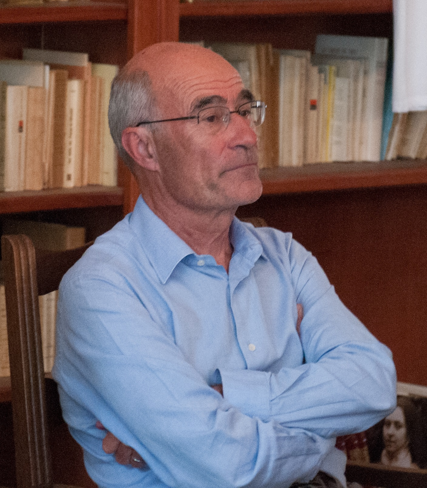 J.-Y. Le Gallou à l'université d'été d'Academia Christiana, en août 2016.